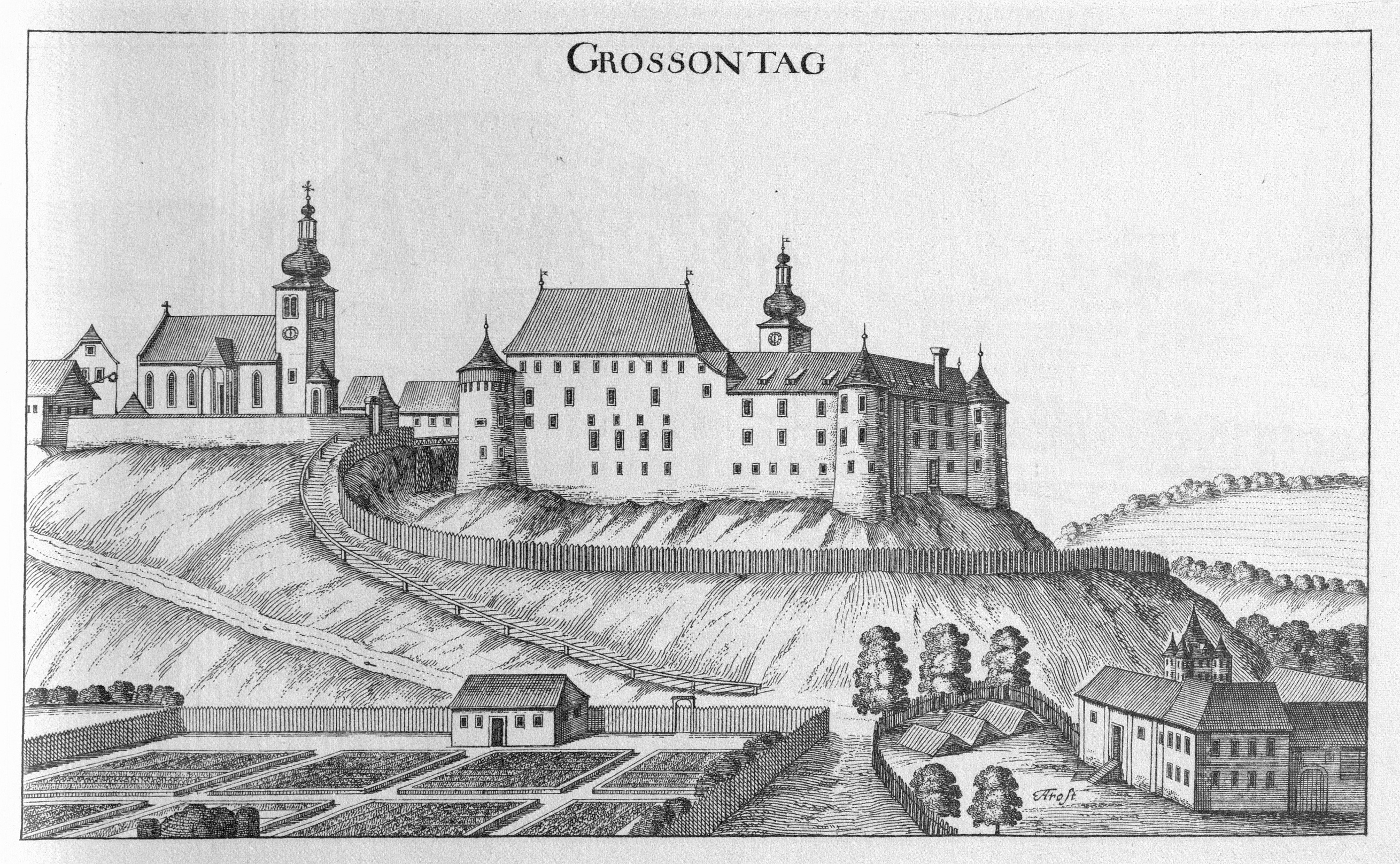 G. M. Vischers Käyserlichen Geographi, Topographia Ducatus Stiriae, Das ist: Eigentliche Delineation / und Abbildung aller Städte / Schlösser / Marcktfleck / Lustgärten / Probsteyen / Stiffter / Clöster und Kirchen / so es sich im Herzogthumb Steyrmarck befinden; Und anjetzo Umb einen billichen Preyß zu finden seynd Bey Johann Bitsch Universitäts Buchhandlern / Auff dem Juden=Platz bey der guldenen Saulen. Graz 1681 Die Nummerierung der Dateien folgt der alphabetischen Reihung der Ortsnamen